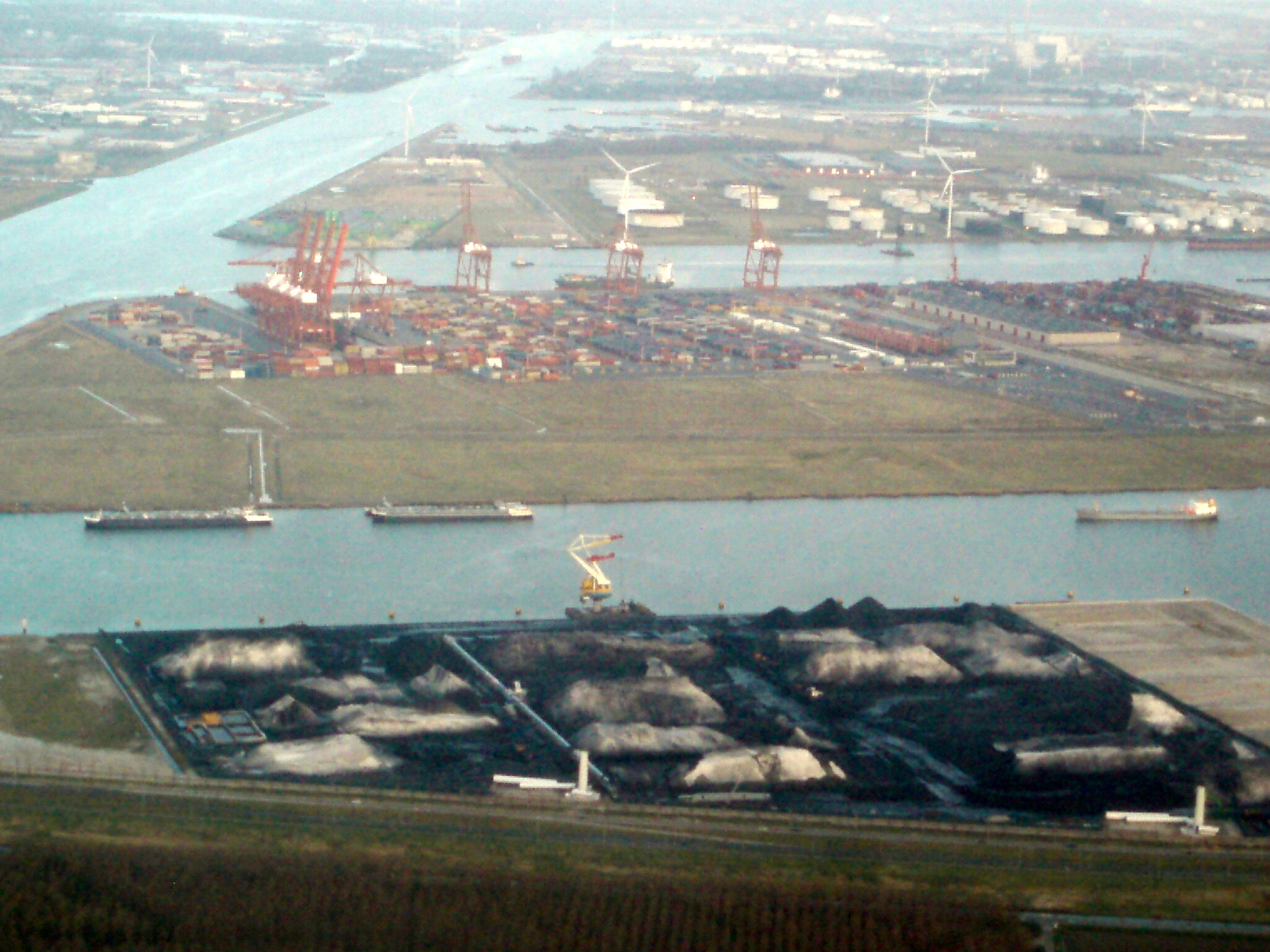 Noordzeekanaal en Afrikahaven gefotografeerd vanuit British Airways vlucht vanuit Londen Heathrow.